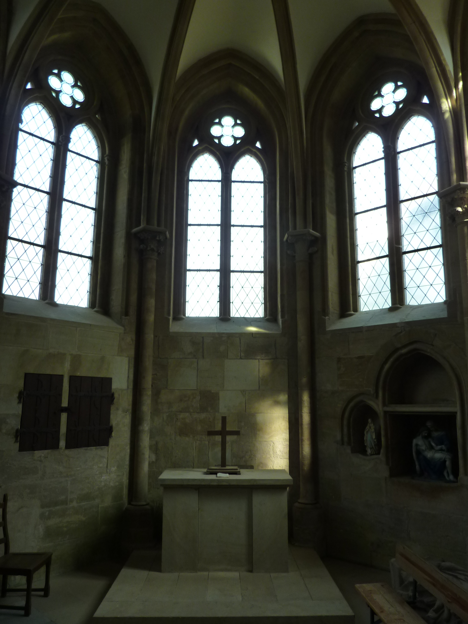 Kapelle, Hof Iben